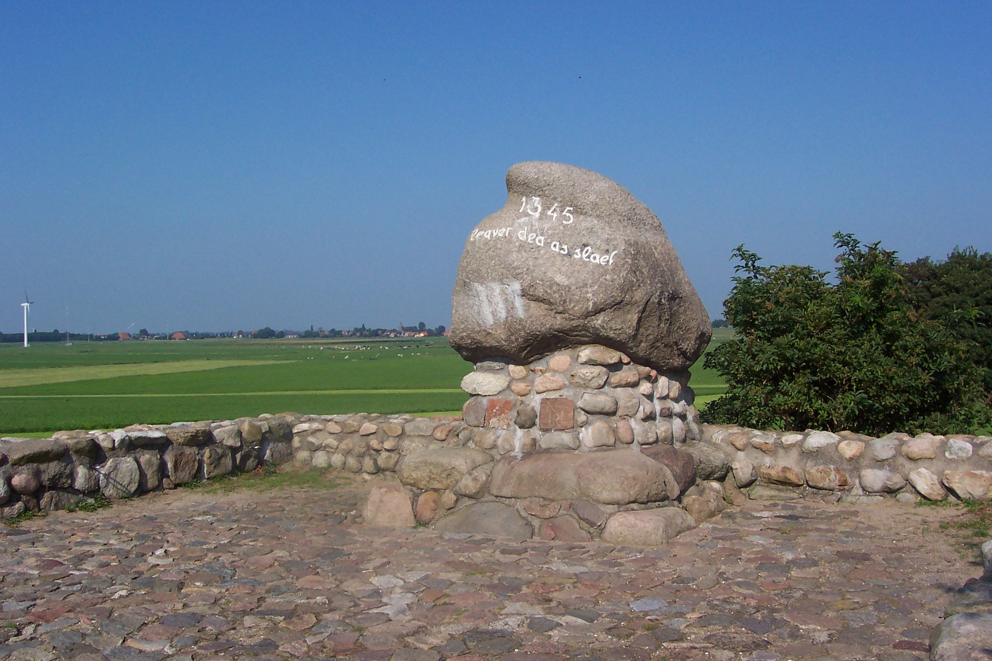 Monument ter herdenking aan de Slag bij Warns